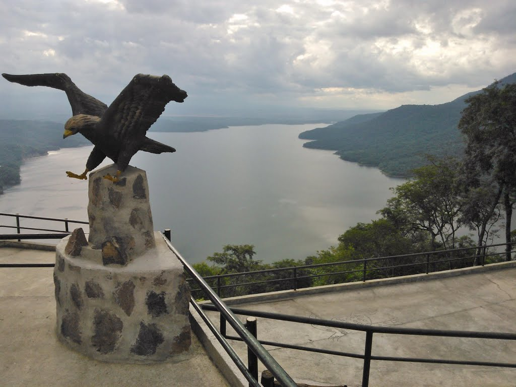 Tucuman